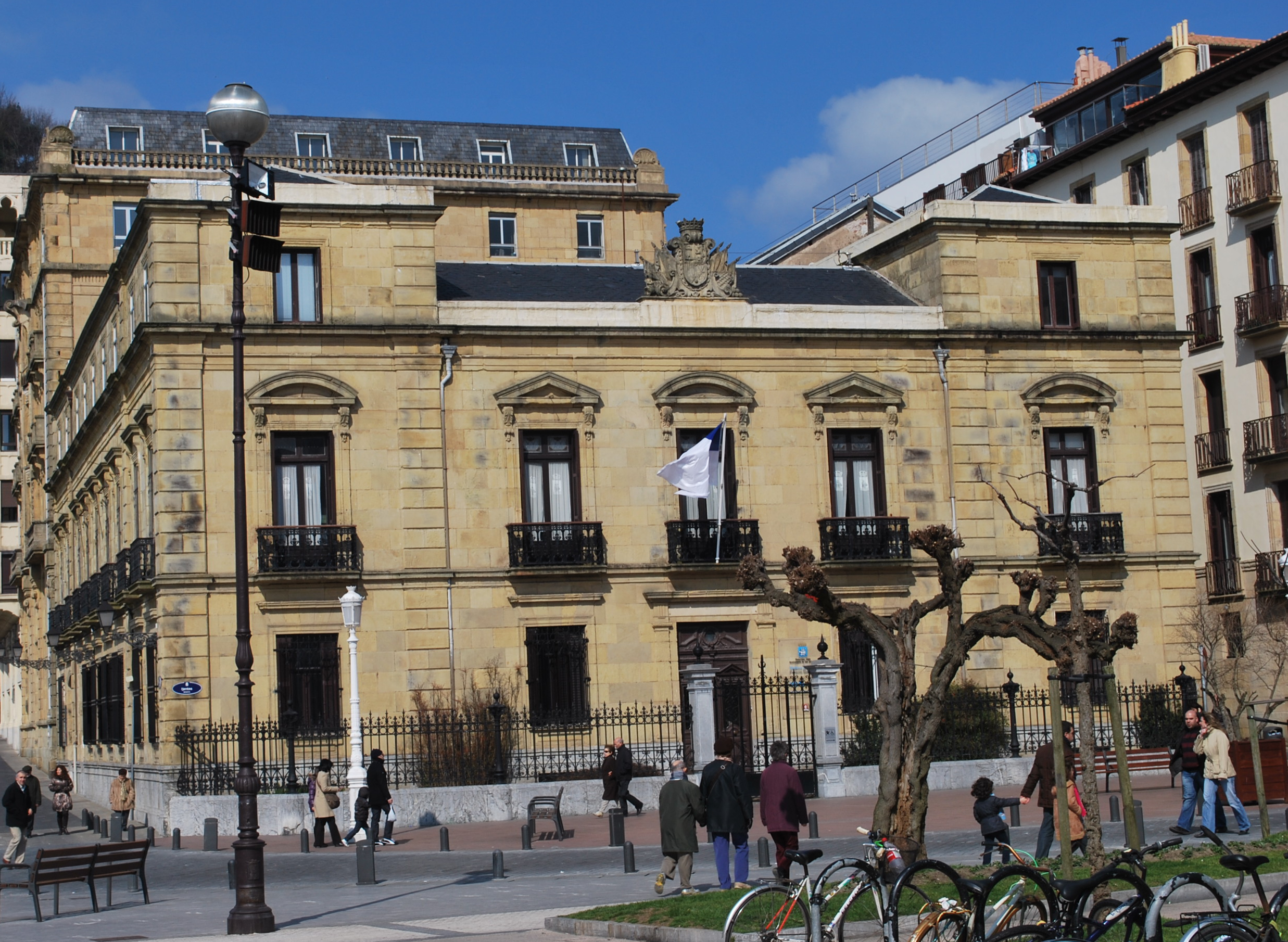 Ancienne caserne militaire à Donosti (Guipuscoa).